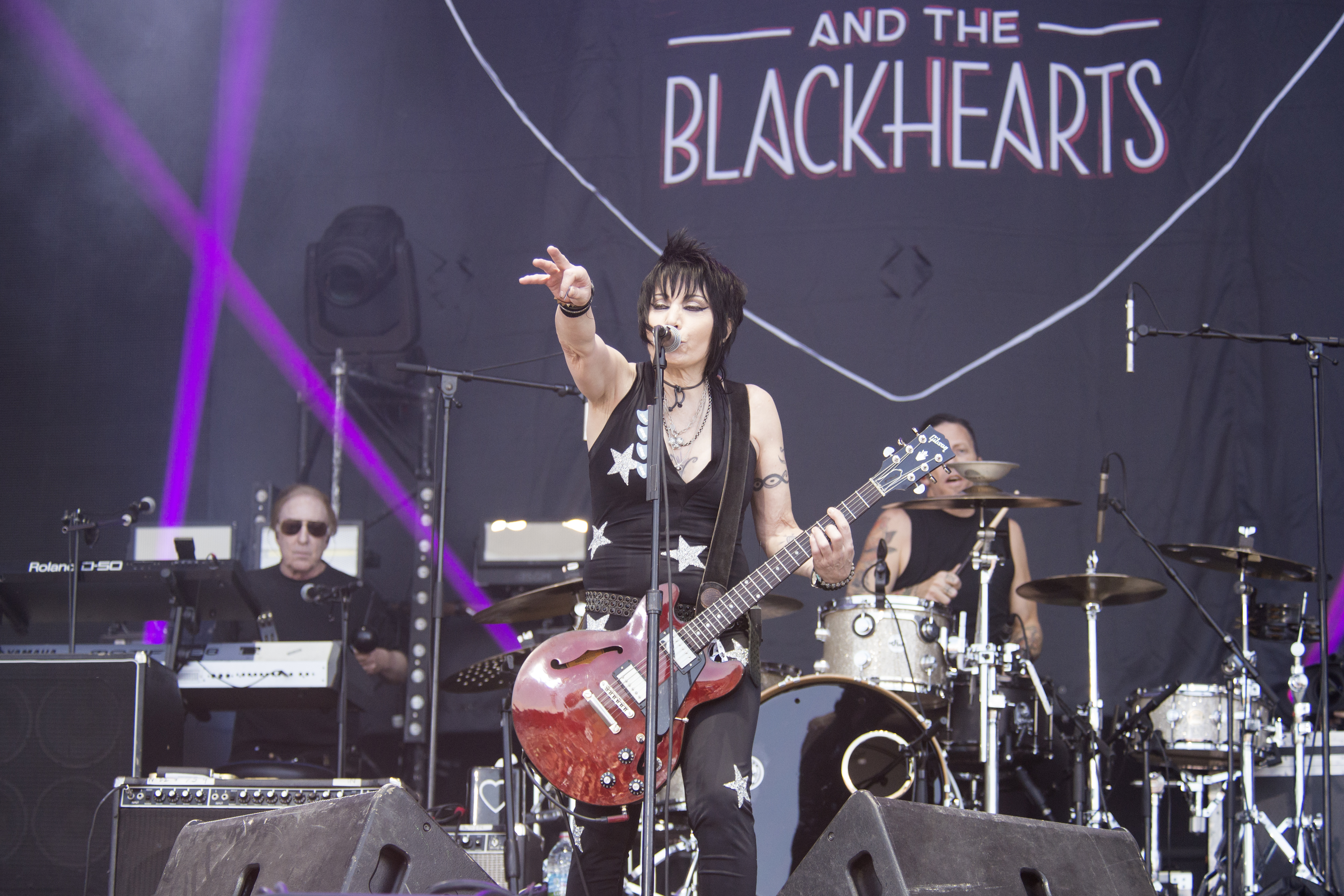 Concert de Joan Jett sur la Main Stage I, Hellfest 2018, Clisson, Loire-Atlantique.